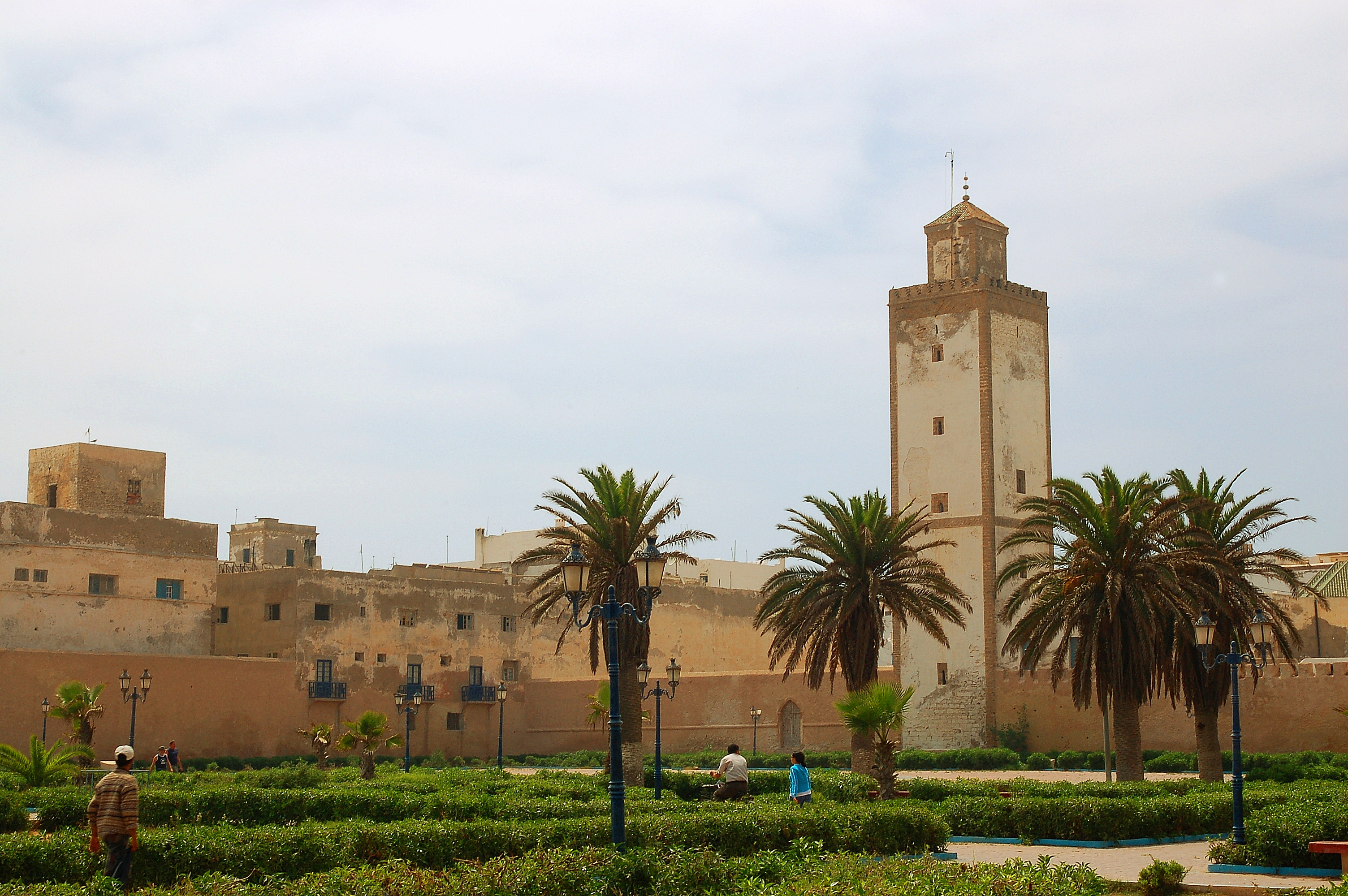 Maroc Essaouira city Remparts de la médina d'Essaouira